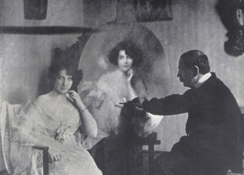 Nair de Teffé, na casa de seu pai, em Petrópolis, é retratada pelo pintor francês Guiraud de Scevola